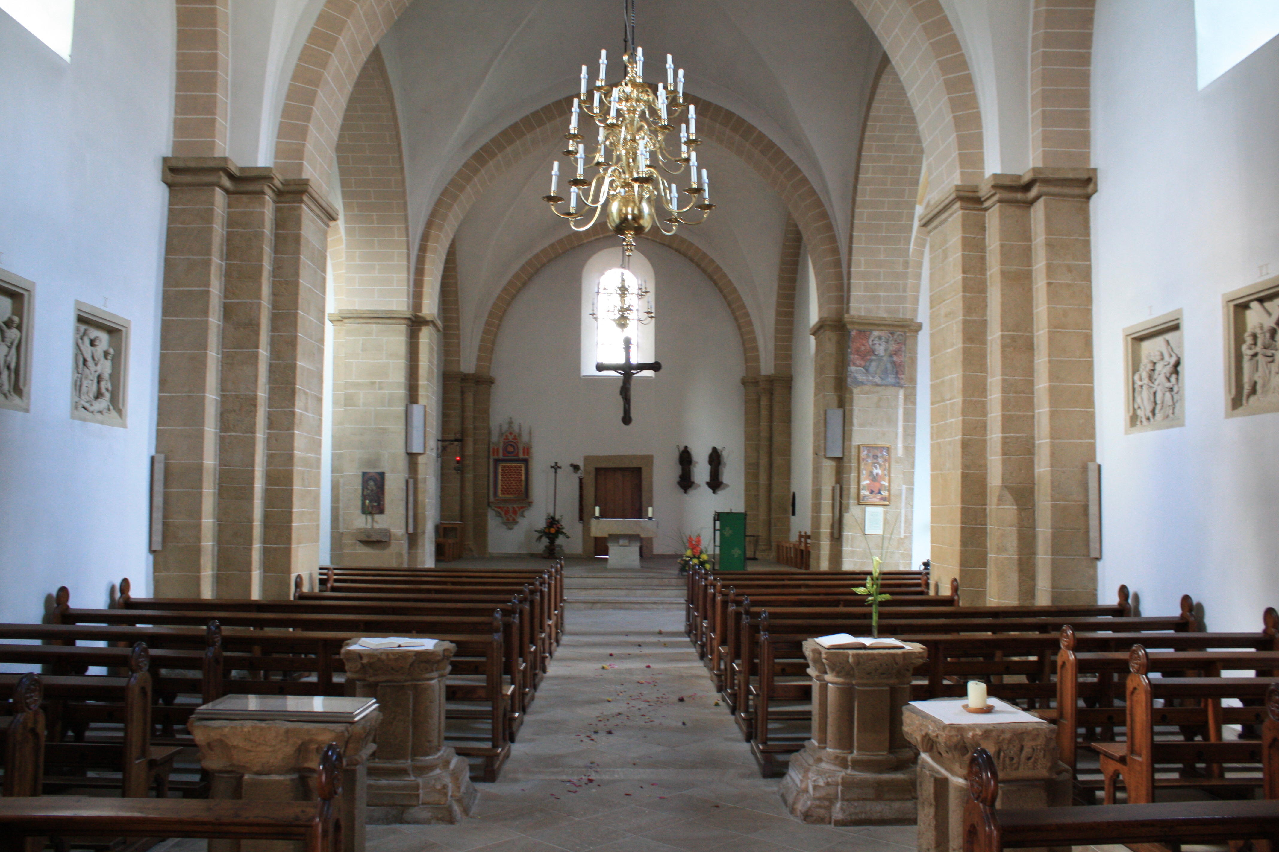 Kloster Oesede, Innenansicht der Kirche